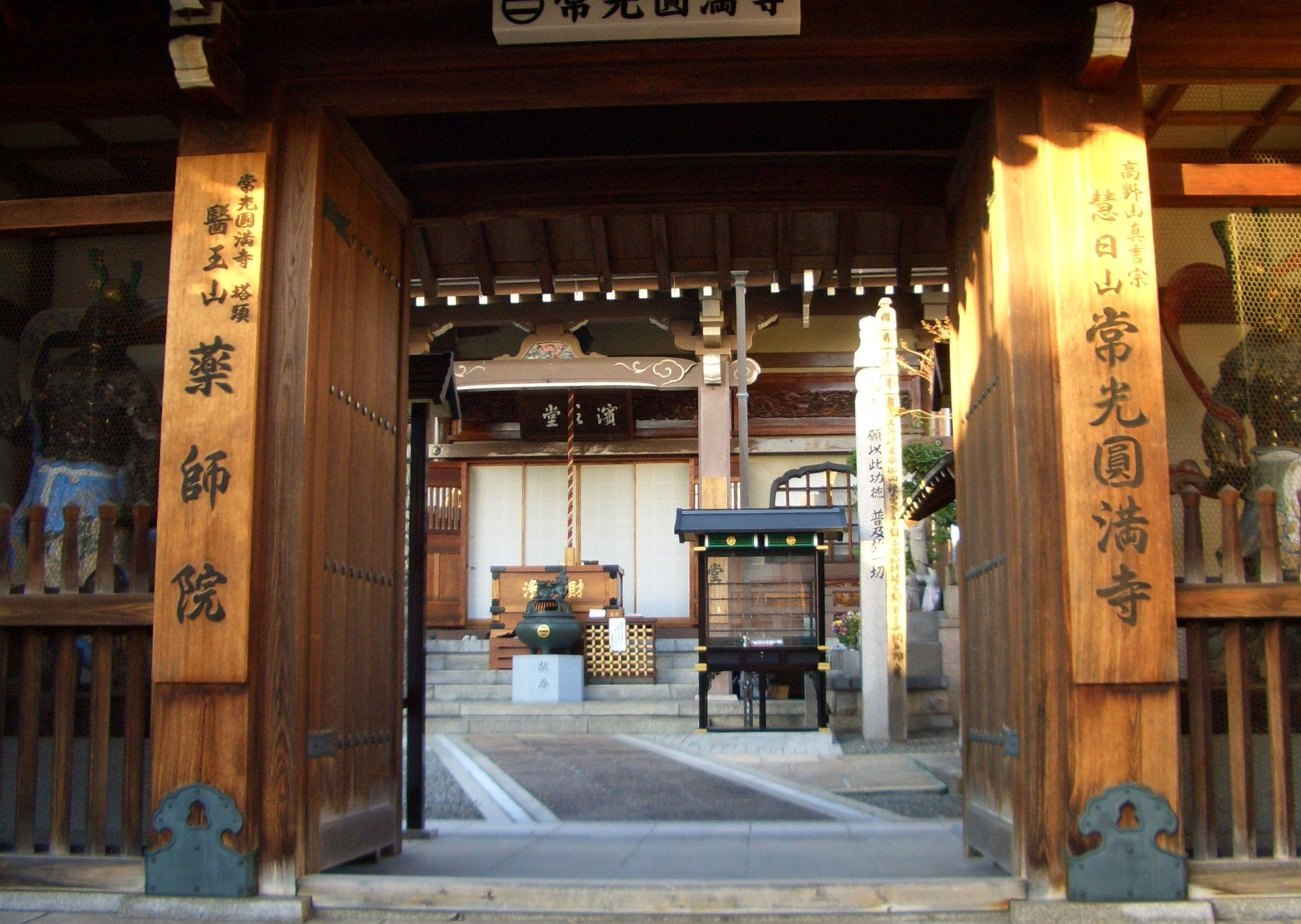 Joukouennmann temple in Suita city,Osaka,Japan.since 736.常光円満寺